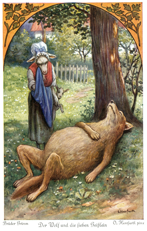 Der Wolf und die sieben Geißlein. Postkartenserie nach dem Märchen. Serie von sechs Postkarten der Firma Uvachrom. Serie 265, Nr. 4519 Text der Rückseite: Der vollgefressene Wolf legte sich unter einen Baum und schlief ein. Die alte Geiß kam aus dem Walde zurück und fand nirgends ihre sieben Kinder. Da schlüpfte das jüngste Geißlein aus seinem Versteck und erzählte, wie der böse Wolf gekommen war. Auf der Wiese fanden sie den schlafenden Wolf, bitterlich weinte die alte Geiß um ihre Kinder.